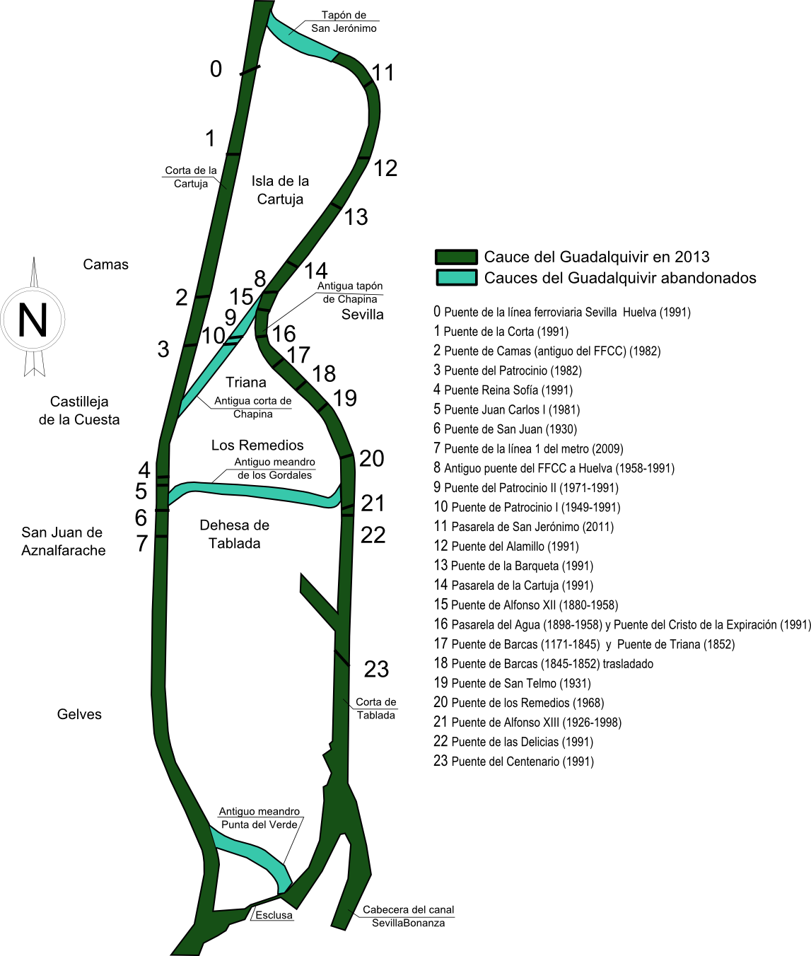 Plano del Río Guadalquivir con la situación aproximada de los puentes que lo cruzan o han cruzado desde la construcción del primero de ellos en 1171, realizado por mi con inkscape